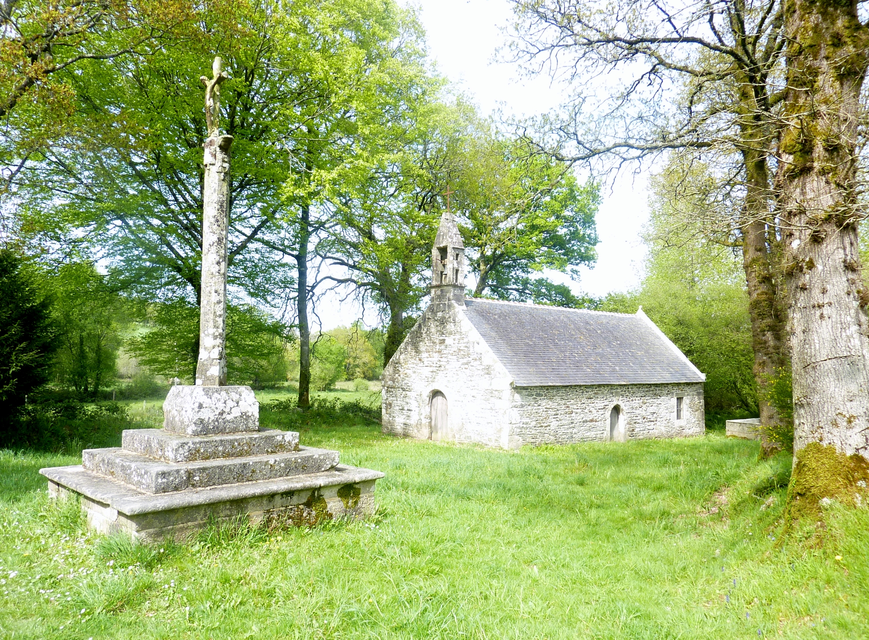 Le placître de la chapelle Saint-Corentin de Trénivel (Trinivel) avec sa chapelle et son calvaire